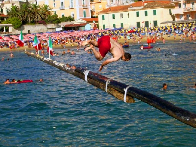 IL gioco di abilità della stuzza che si svolge da oltre 100 anni a s.maria dicastellabate il 14 agosto